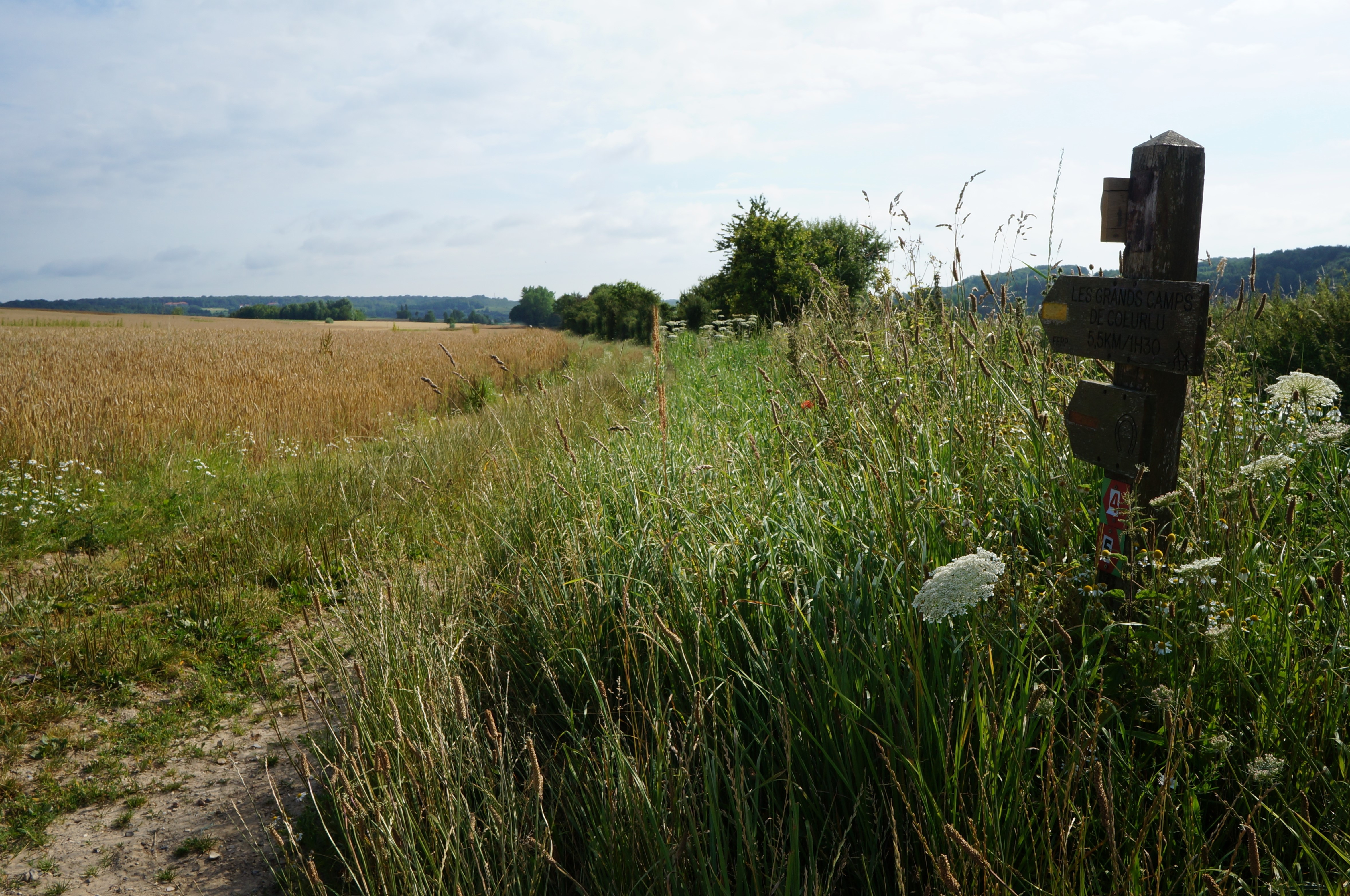 Monts d'Affringues Pas-de-Calais Hauts-de-France